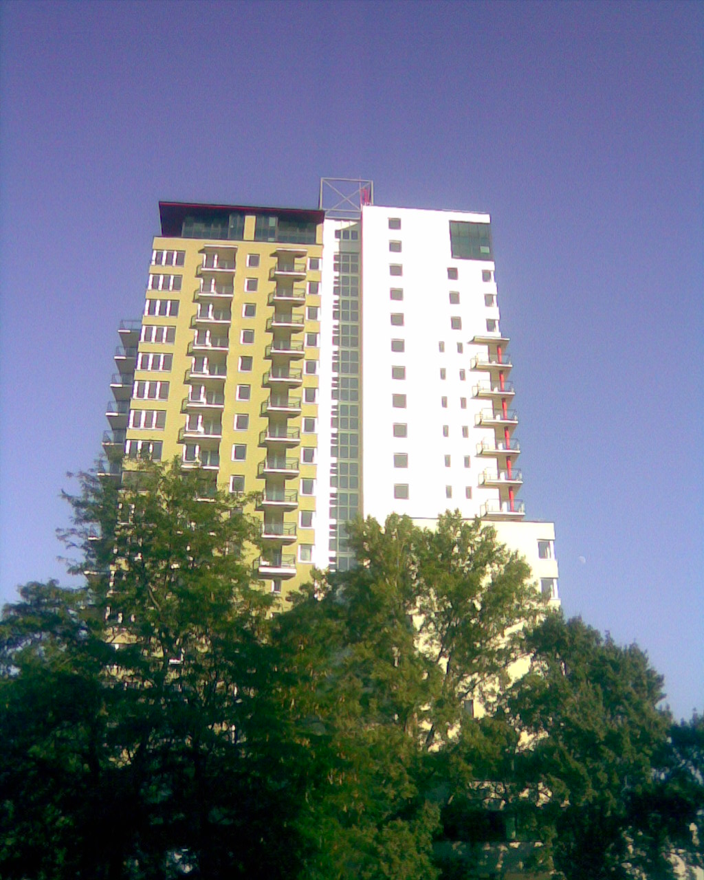 Universo